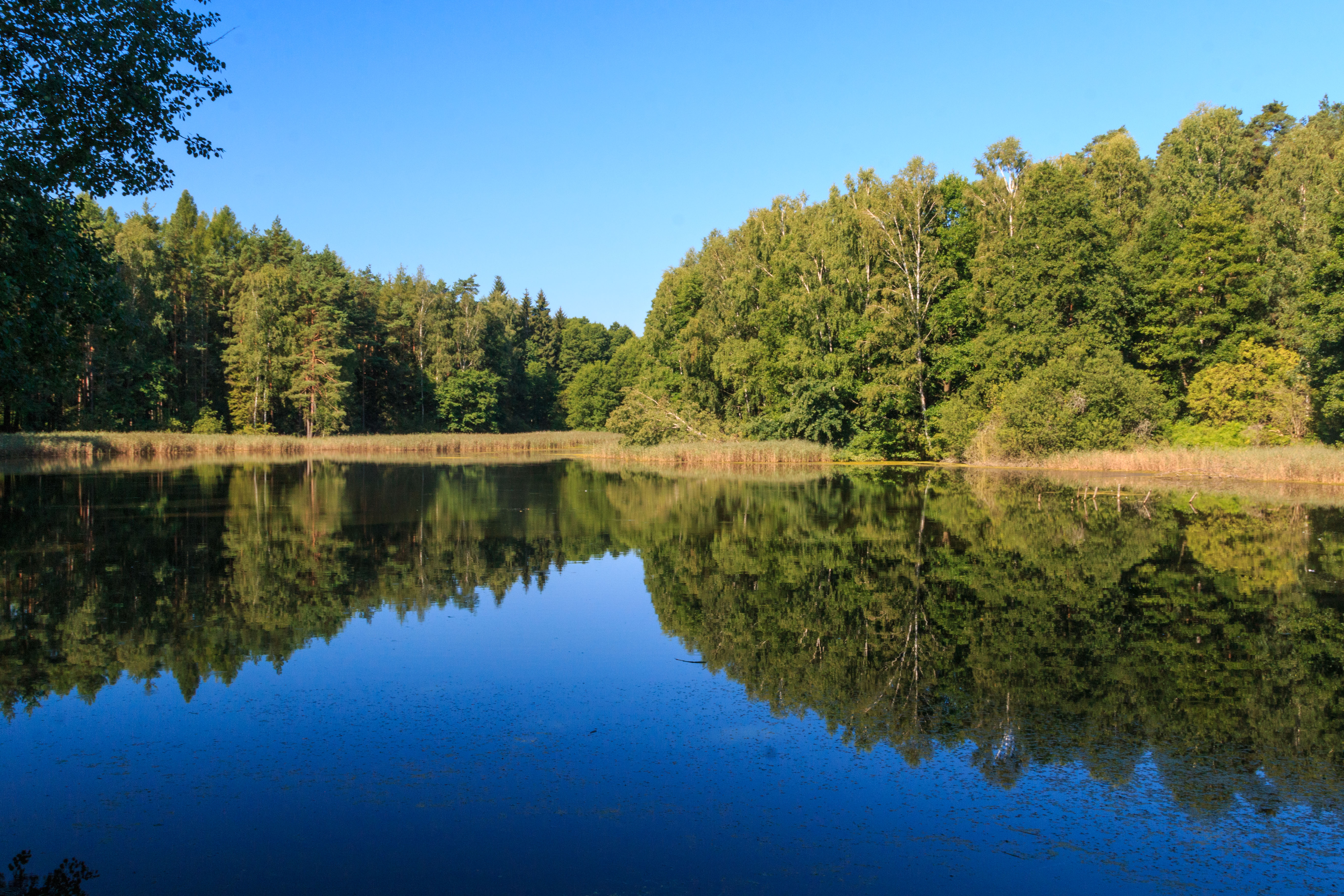 Rybník Horní Pecák Project: Vodstvo.